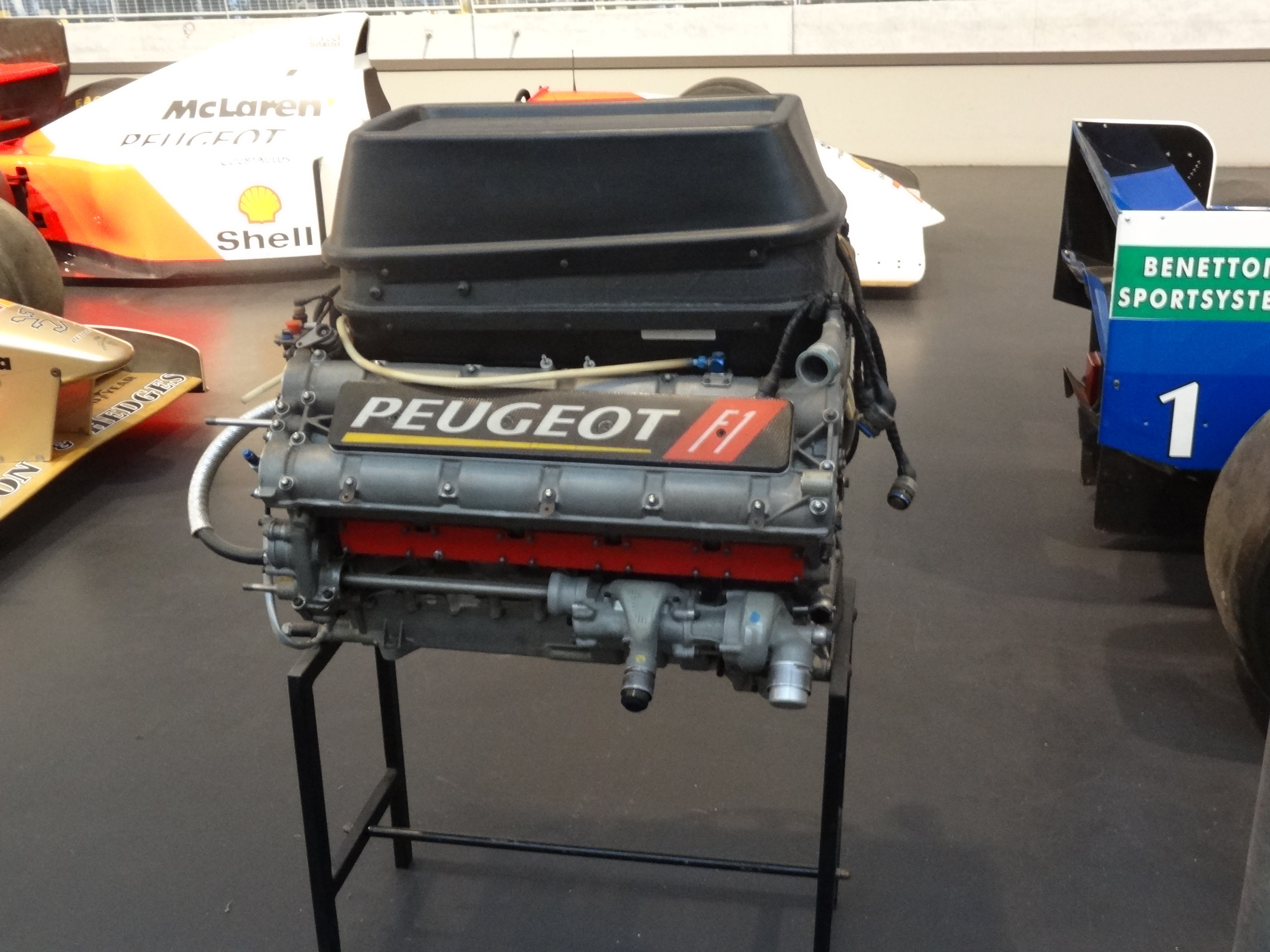 V10 Peugeot (F1)